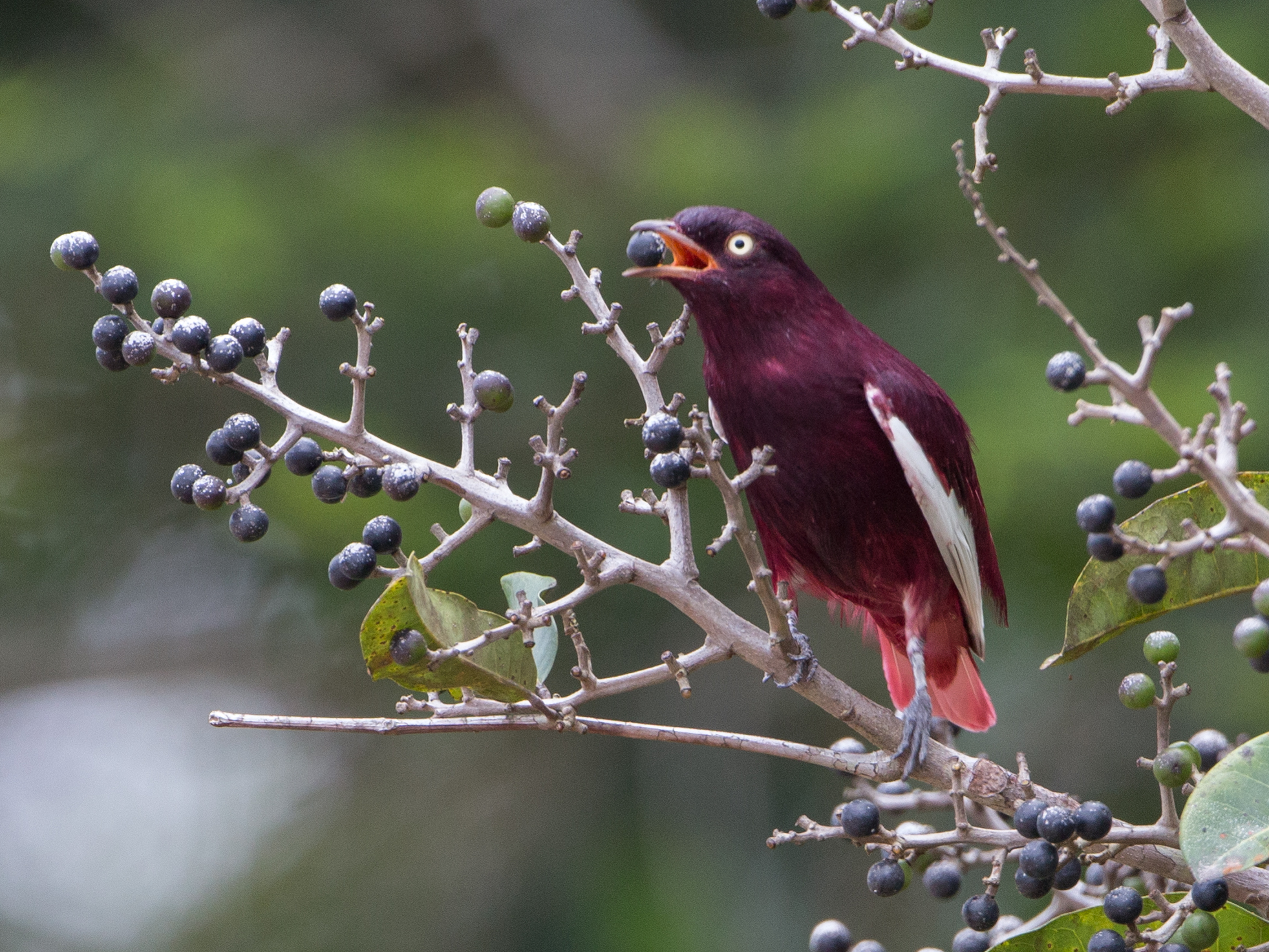 Anambé-pompadora (Xipholena punicea) macho